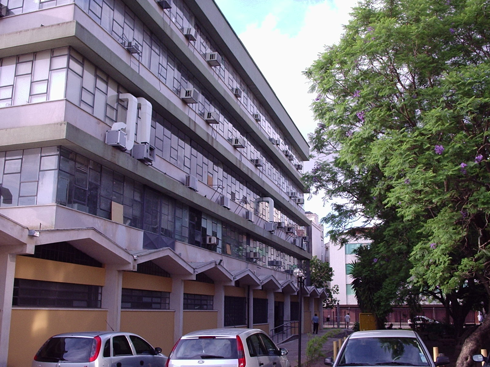 Fachada da Faculdade de Biblioteconomia e Comunicação da UFRGS, popularmente chamada "Fabico", em Porto Alegre, Brasil.